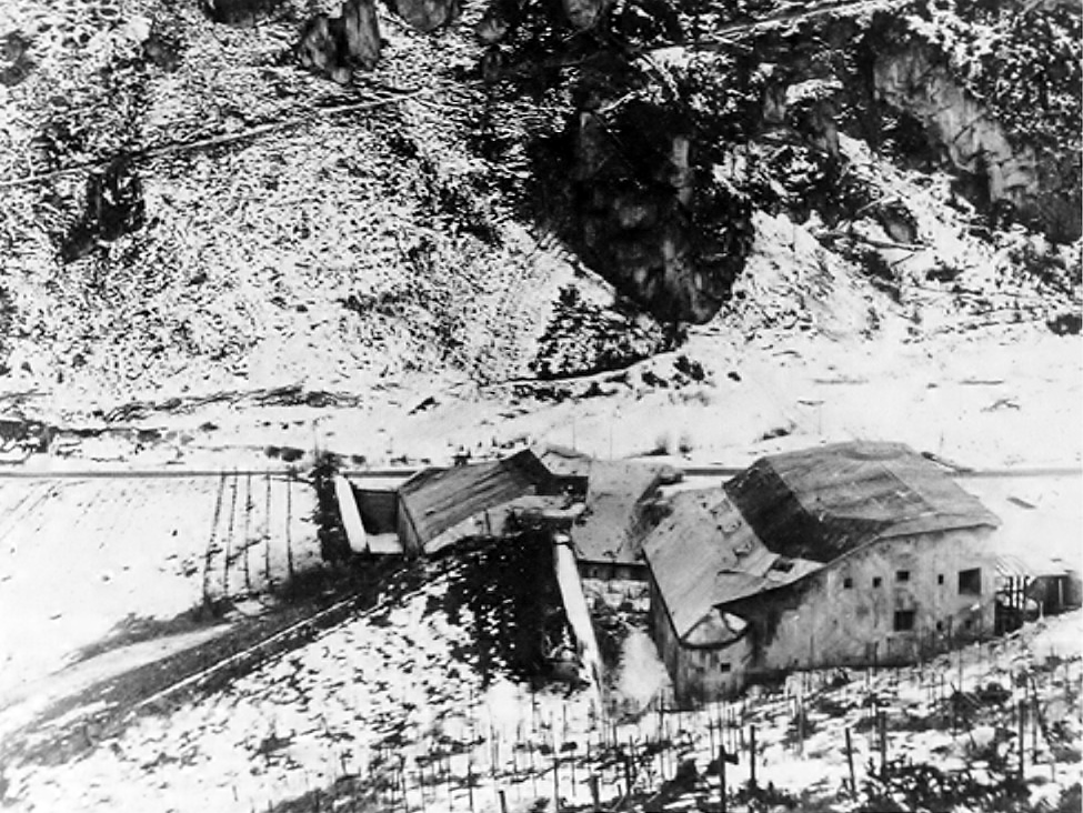 Forte Landro da ovest